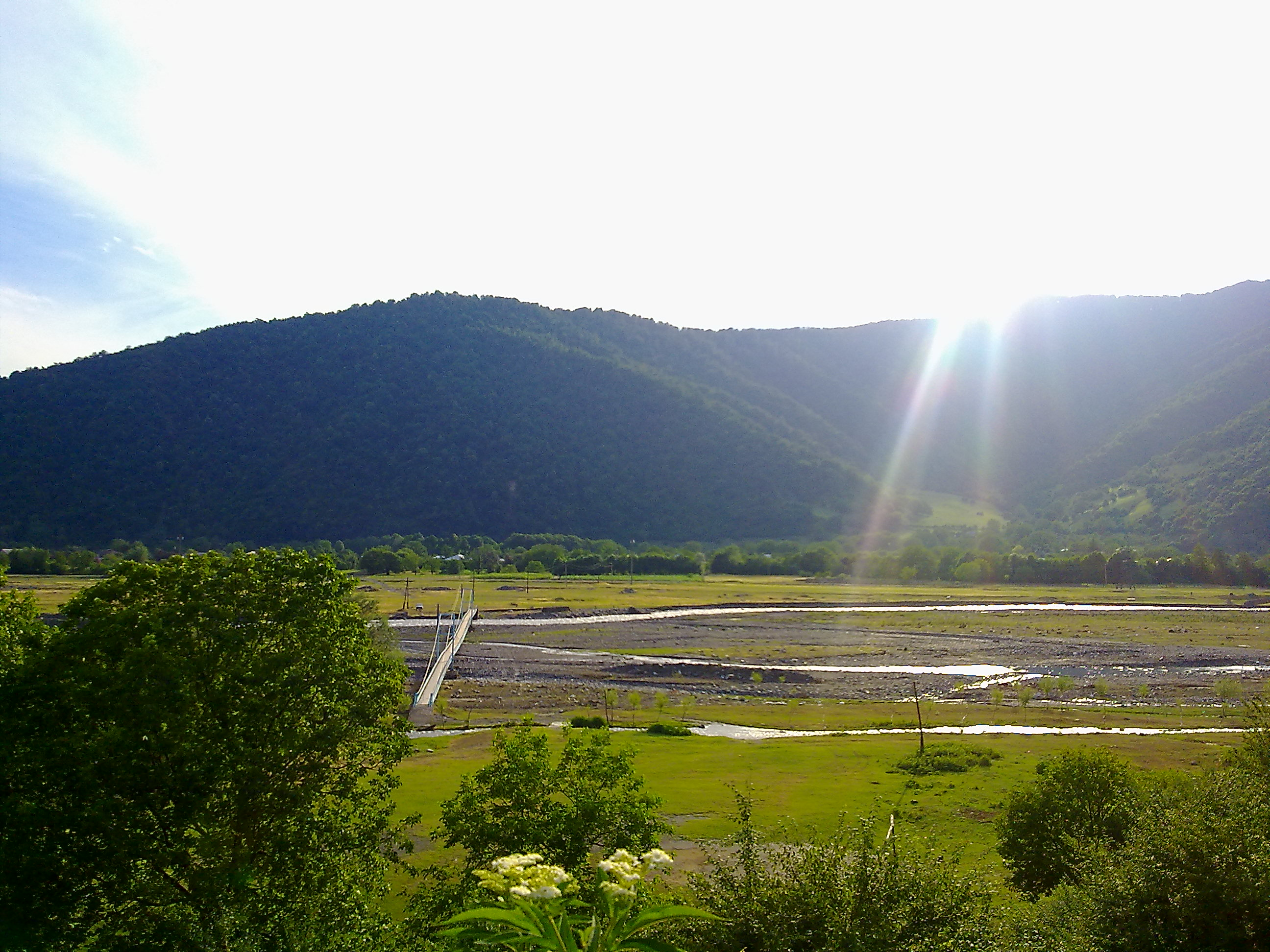 Река у села Омало